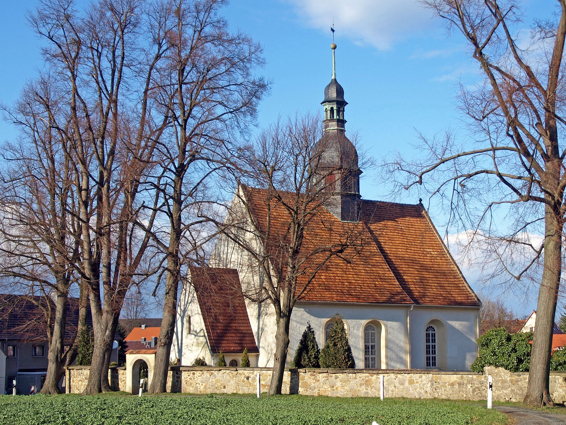 Kirche in Buchholz (Vierkirchen)